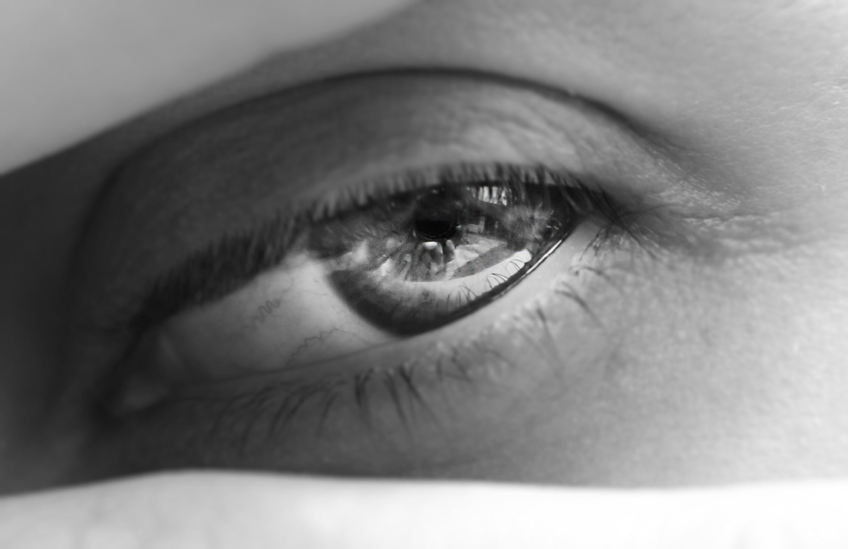 Os olhos são realmente o que nossa alma sente. Pode-se ver seus temores, alegrias e tristezas. Araraquara-SP Fev/2015.